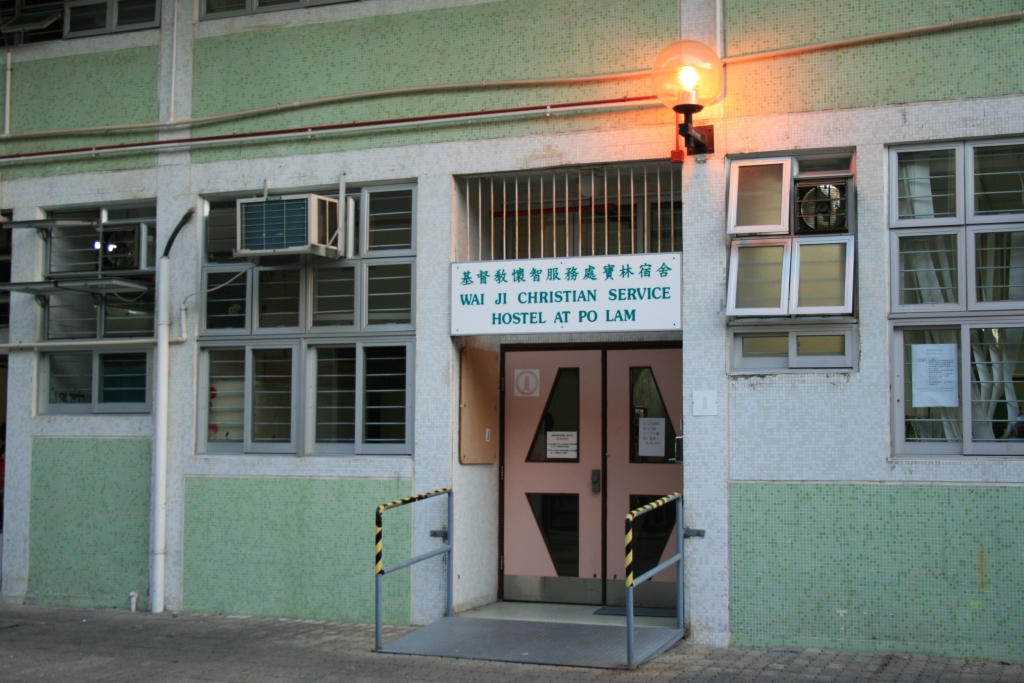 基督教懷智服務處寶林宿舍